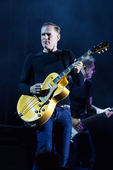 20130710-ByanAdamsLucca-0019